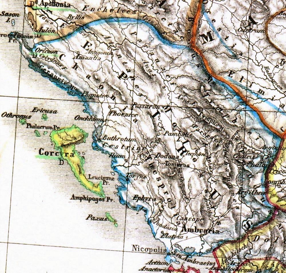 regio Epirus, tempus antiquitatis